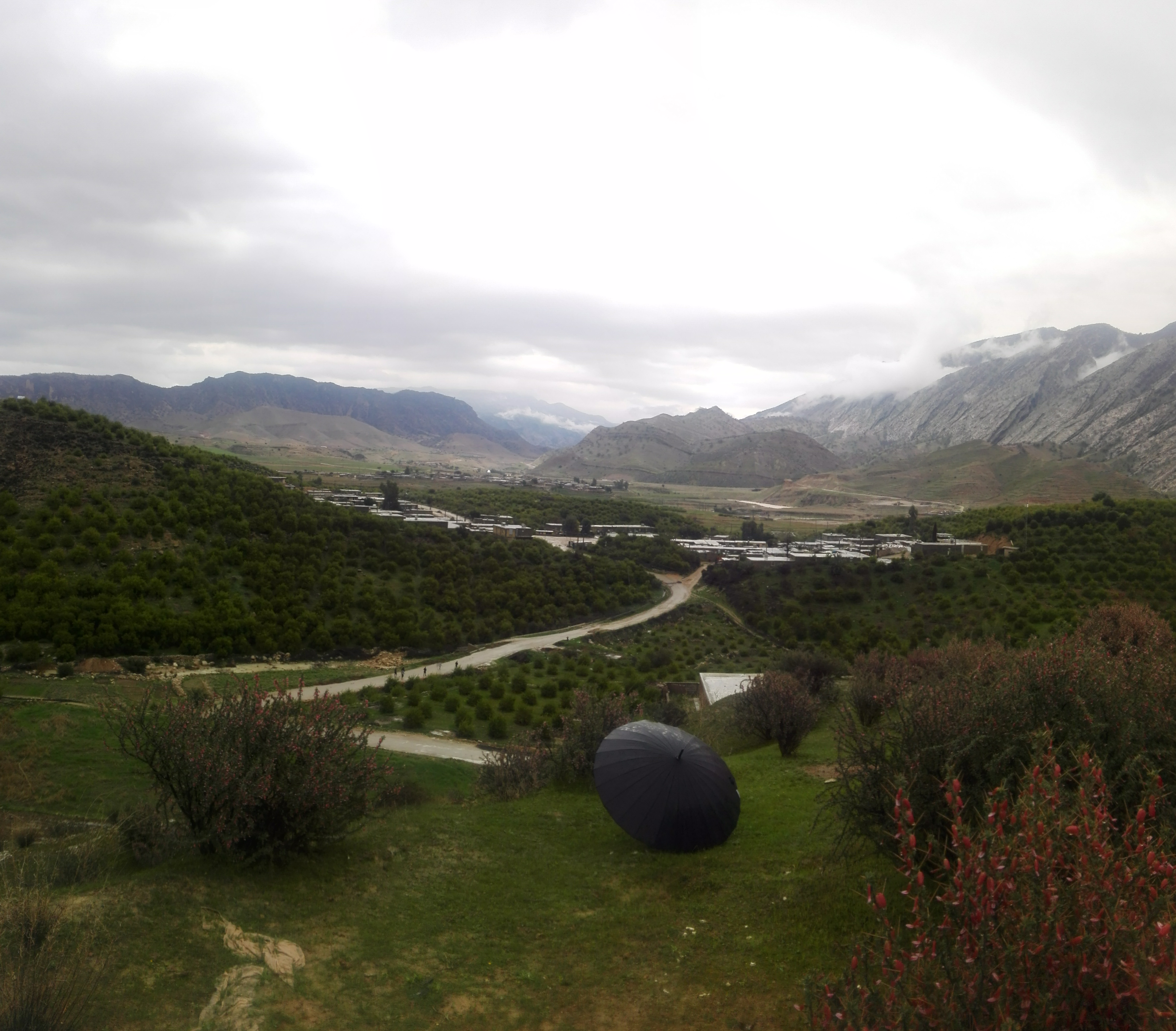 اسد عدالت پرور